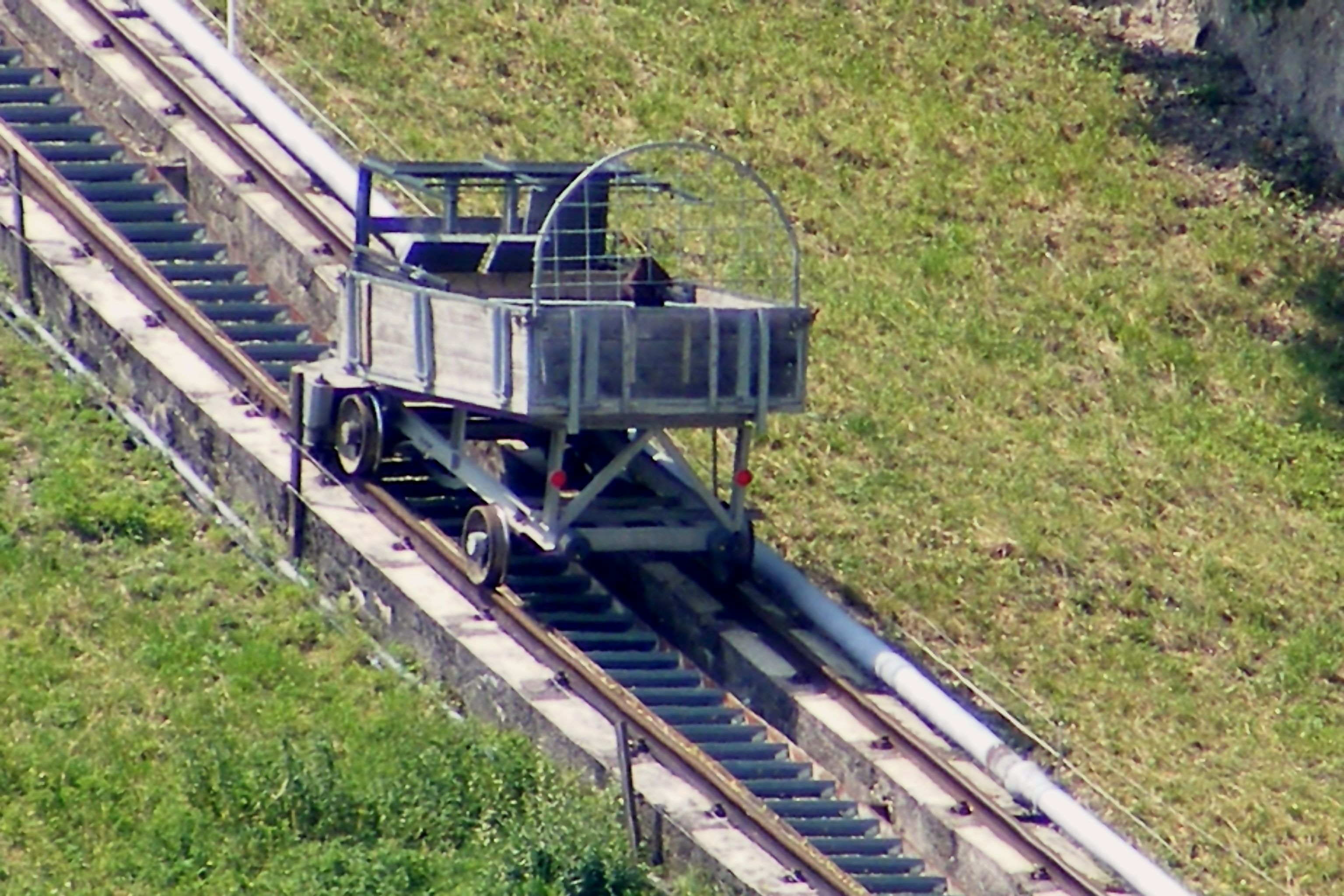 Gütertransportwagen des sogenannten Reißzugs, einer Material-Standseilbahn auf die Festung Hohensalzburg in Salzburg